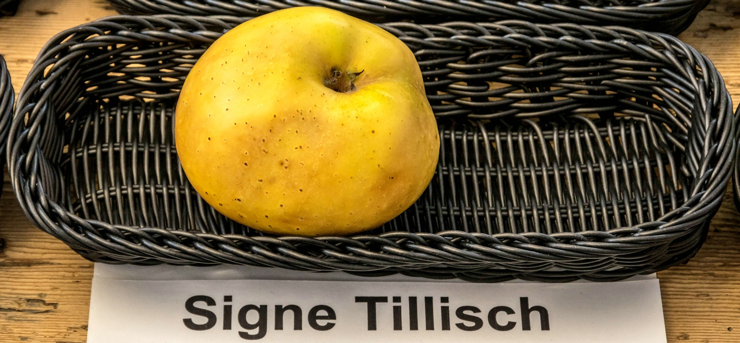 Alte Apfelsorten, von denen es im Badischen noch tragende Bäume gibt. Alle Aufnahmen au dem Oktober 2015